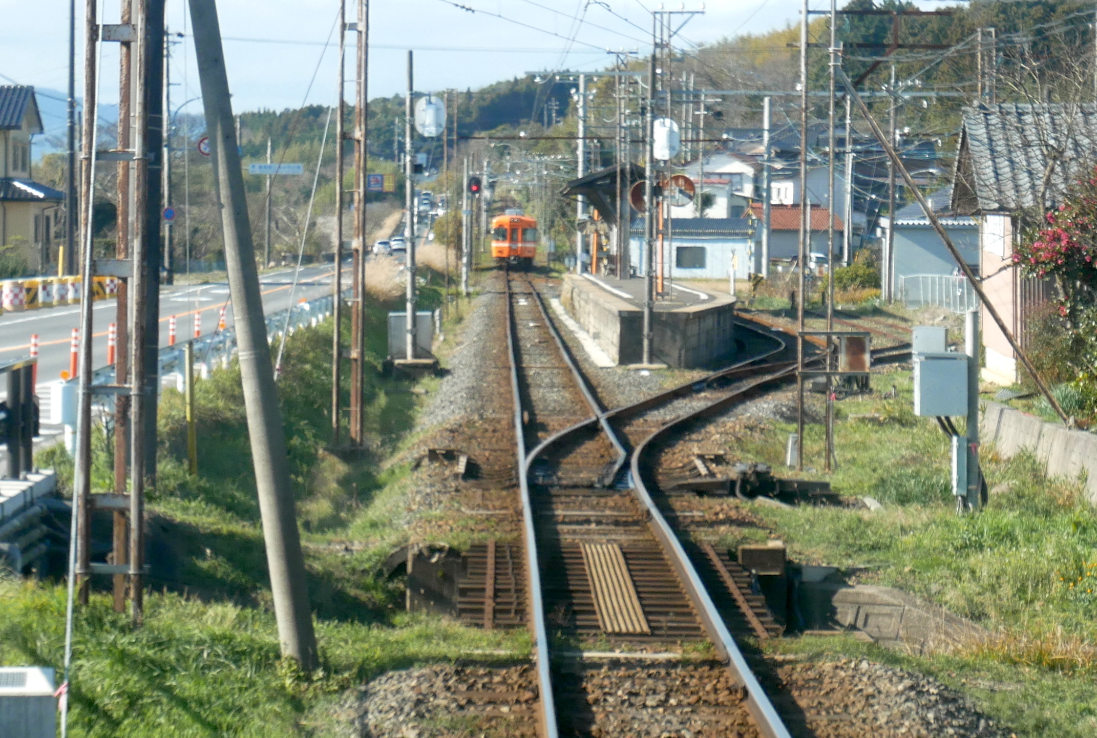 Tsunomori Station (津ノ森駅)